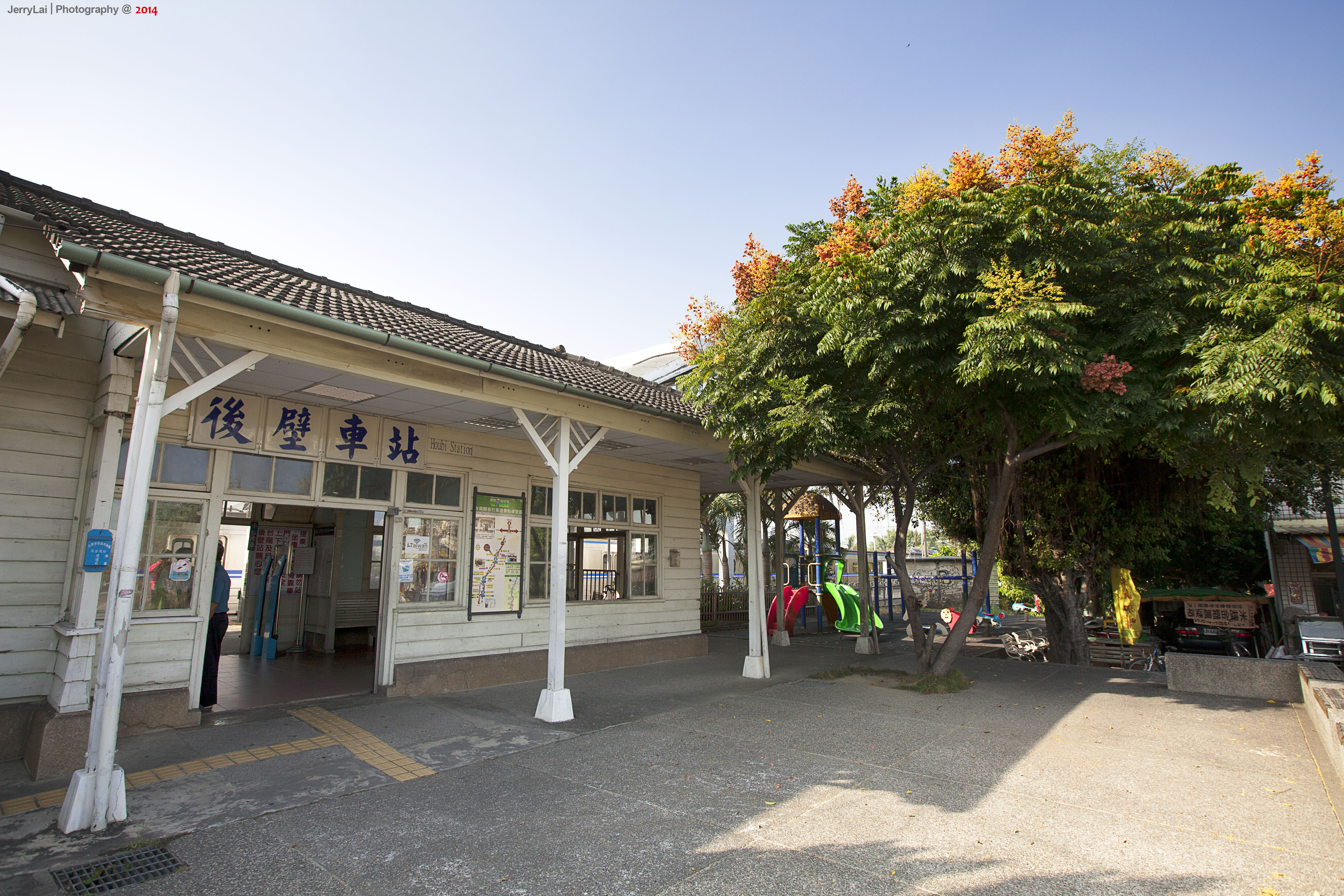 臺灣鐵路管理局後壁車站。